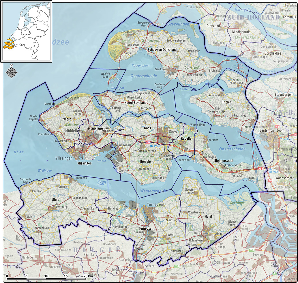 Kaart van de Nederlandse provincie Zeeland, met gemeentegrenzen per 2012 en impressie van het landschap. Referentie-ondergrond (kustlijn, steden, wegen) gerasterd uit de OpenStreet Map OSM. Inhoud is beschikbaar onder de Creative Commons Attribution-ShareAlike 3.0 license. Referentie-ondergrond op water bewerkt vanuit Gebruik is vrij met bronvermelding NLR en ESA. Vectorgrenzen van gemeenten op basis van het vrij te gebruiken geo-bestand van het CBS. Hoogte-aanduidingen (reliëf) gerasterd uit de AHN Viewer ( gebruik is vrij met bronvermelding (c) AHN, Overige kenmerken op de kaart: eigen tekenwerk.